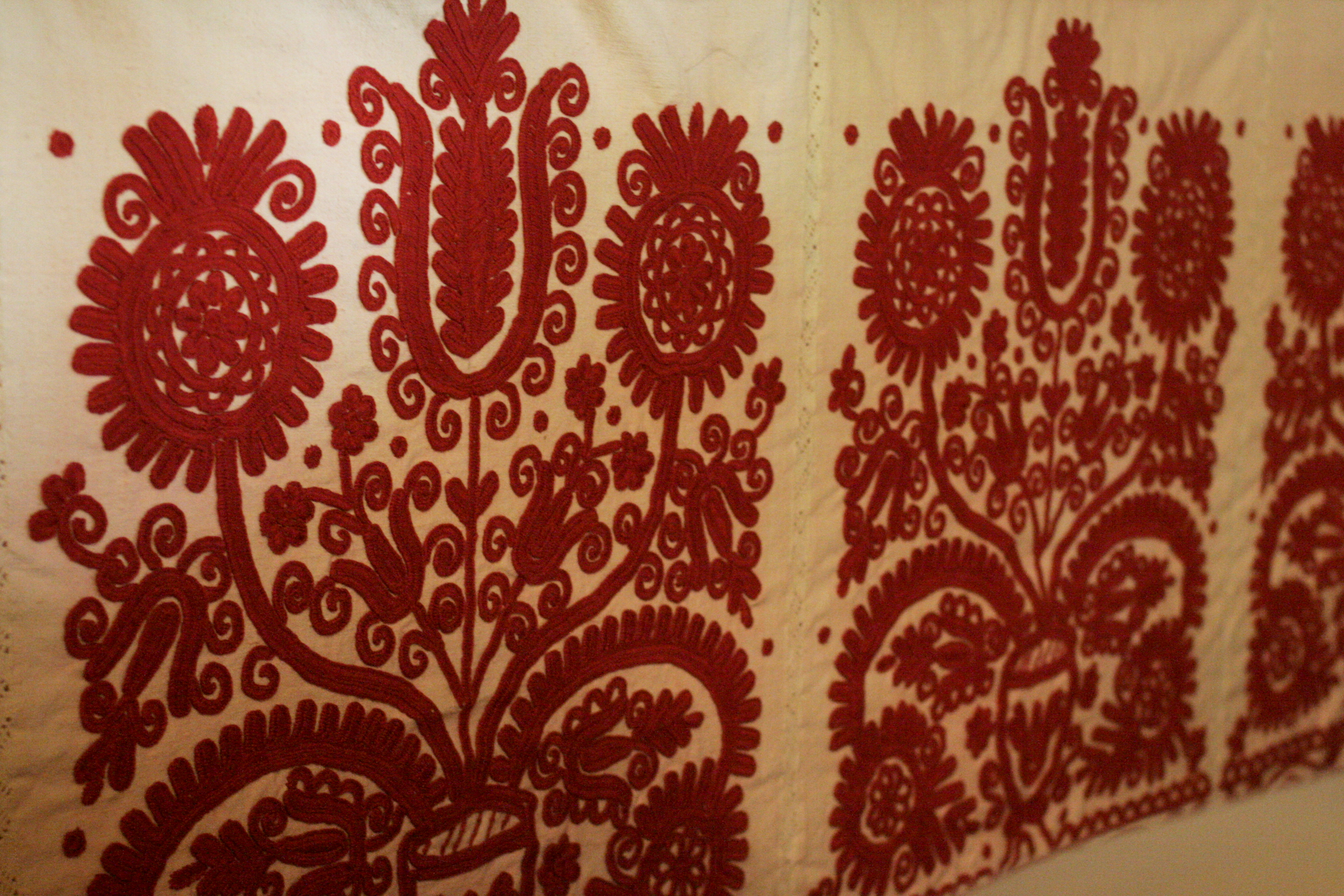 Kalotaszegi írásossal varrt lepedő (Erdély)